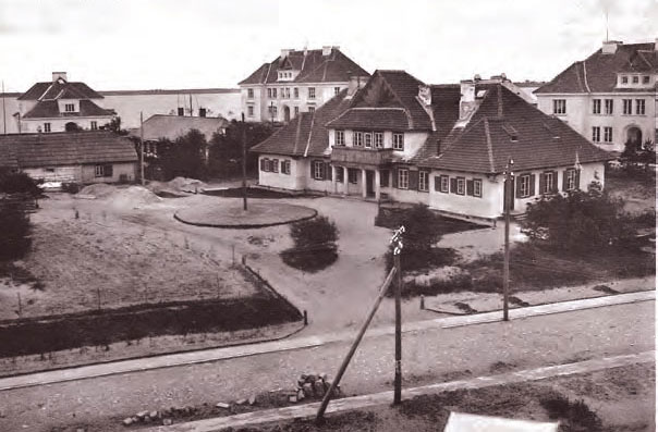 Беларуская (тарашкевіца): Браслаў (Brasłaŭ). Калёнія ўраднікаў (Kalonija)